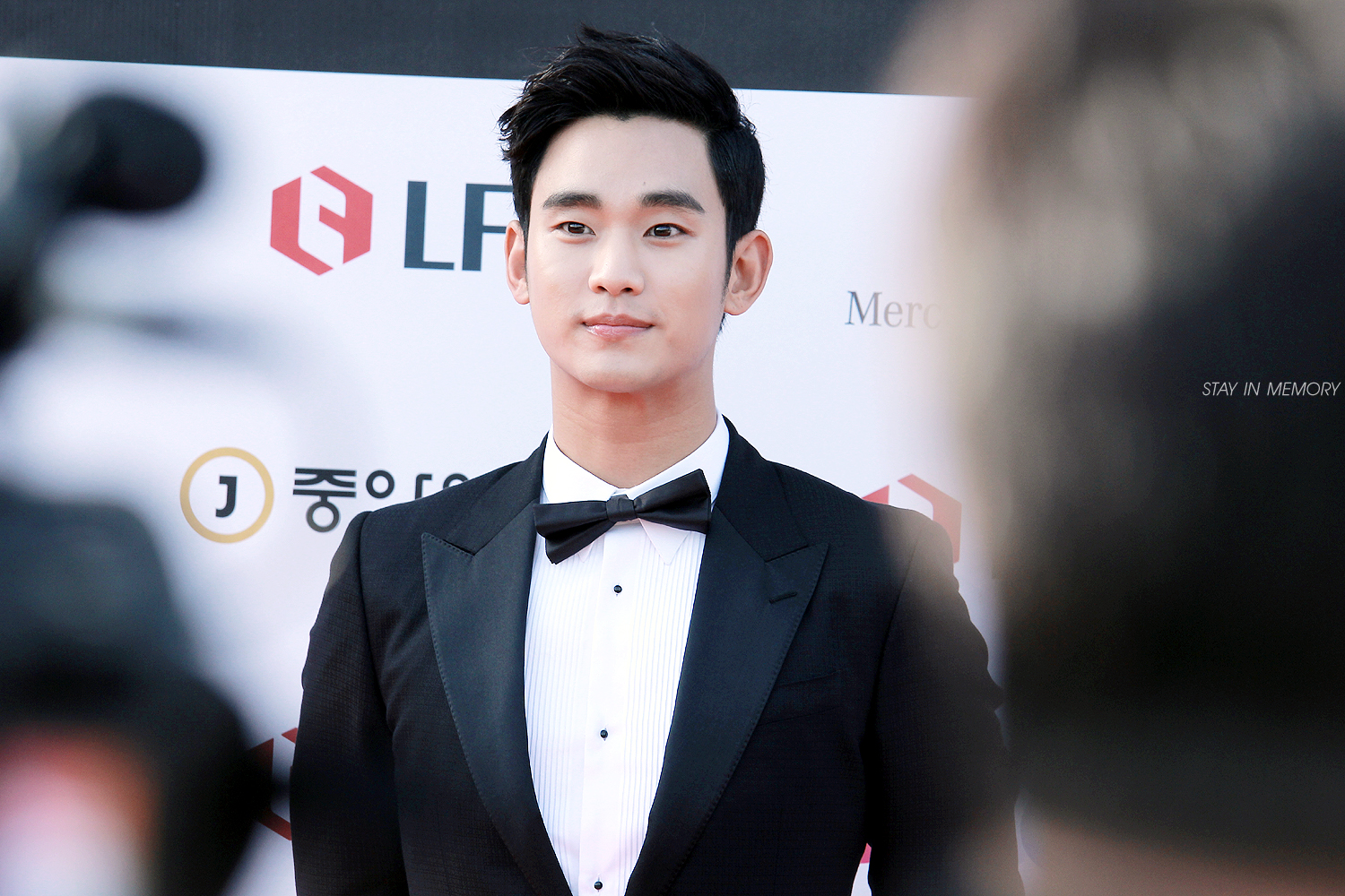 2014 백상예술대상.